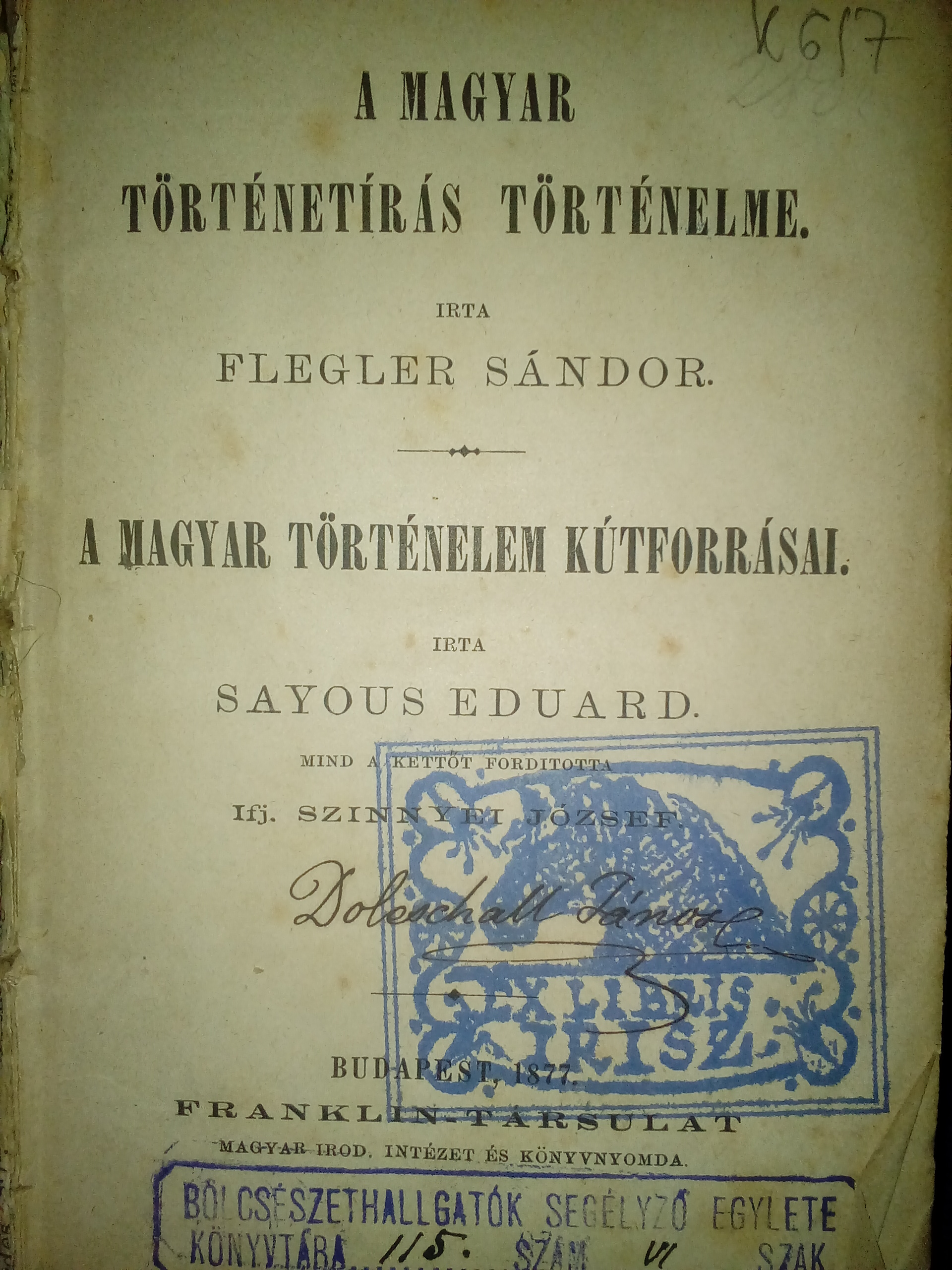 Az adott könyv címlapja.